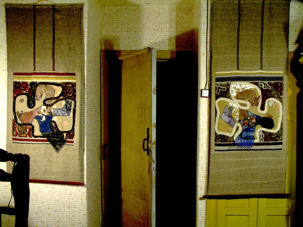 Парные свитки со свастиками